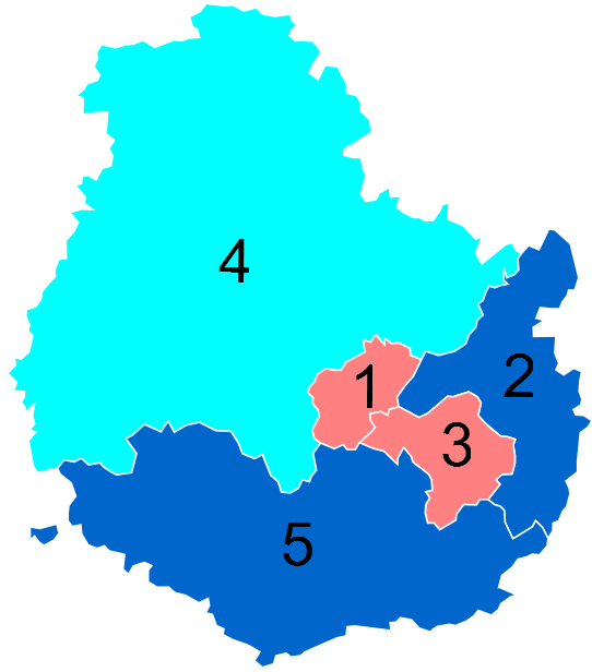 Résultats des élections législatives de la Côte-d'Or en 2012